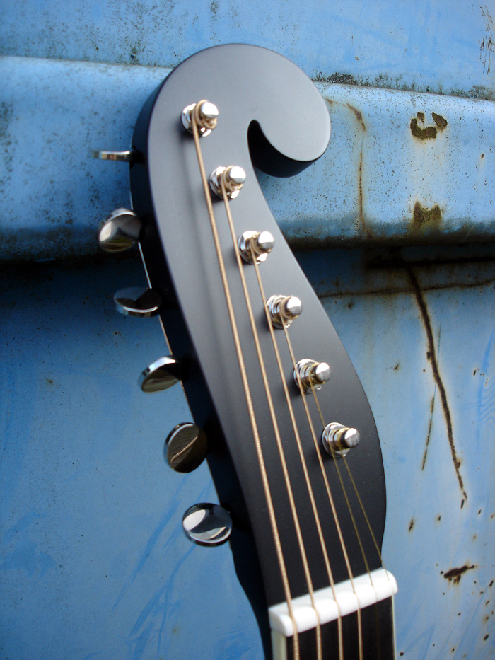 Kopfplatte der Martin 00 Stauffer Ltd. Edition